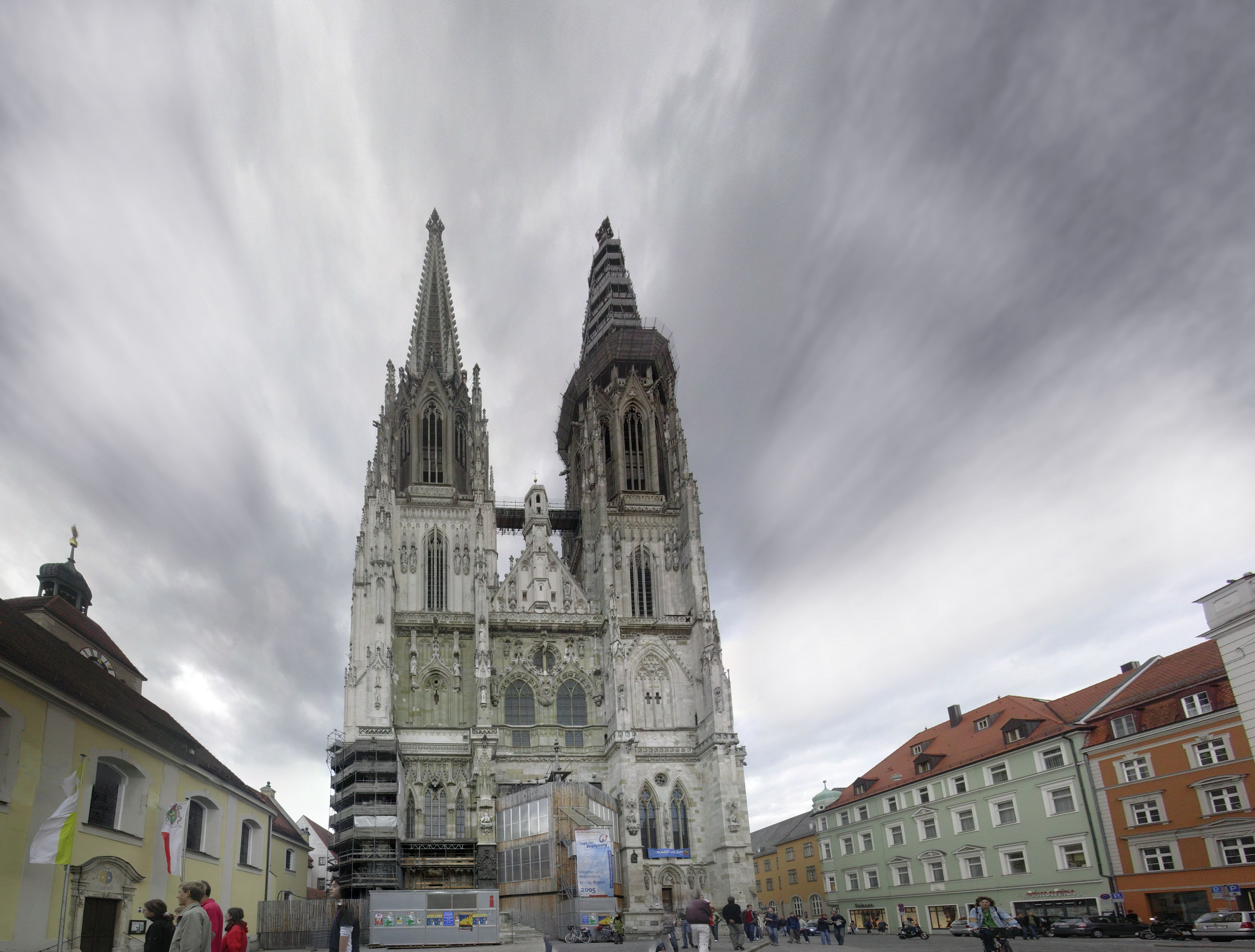 La cathédrale de Ratisbonne sur le parvis, prise en photo le 10 Juin 2006. Photo prise par F. Millour.